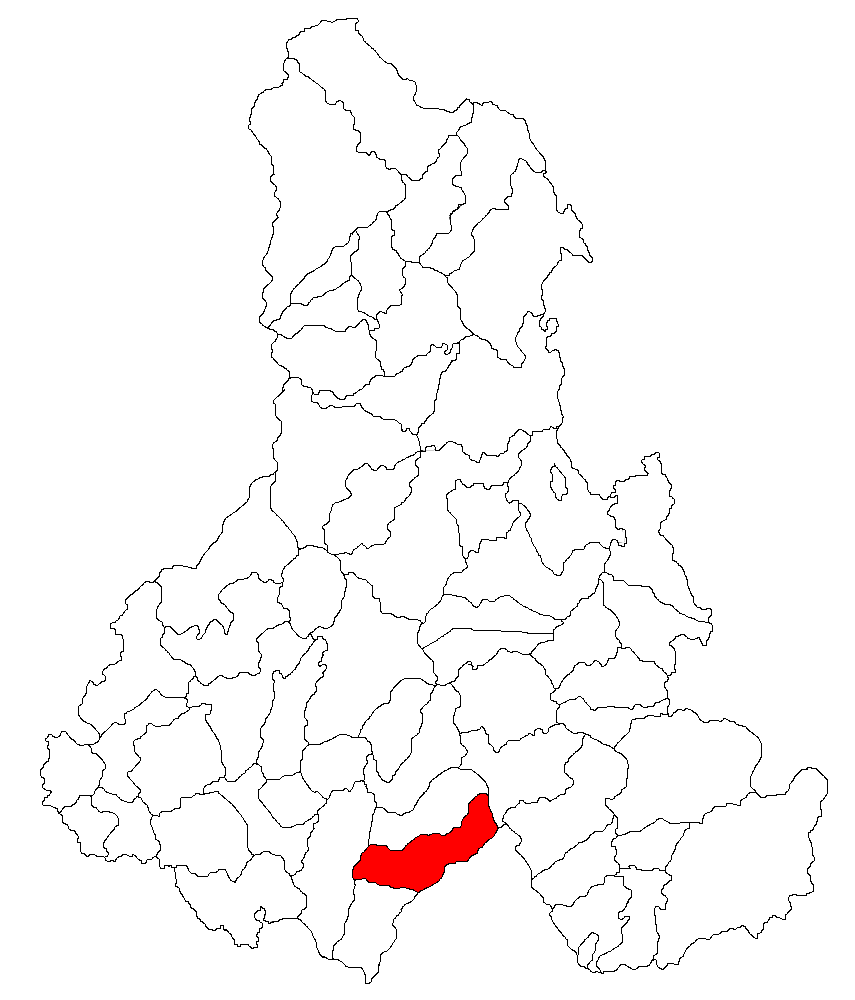 Categorie:Hărţi ale judeţului Harghita Contents 1 Licensing 2 Sursă 3 Licensing 4 Original upload log Licensing Sursă ro::Imagine:Harta_jud_Harghita.png